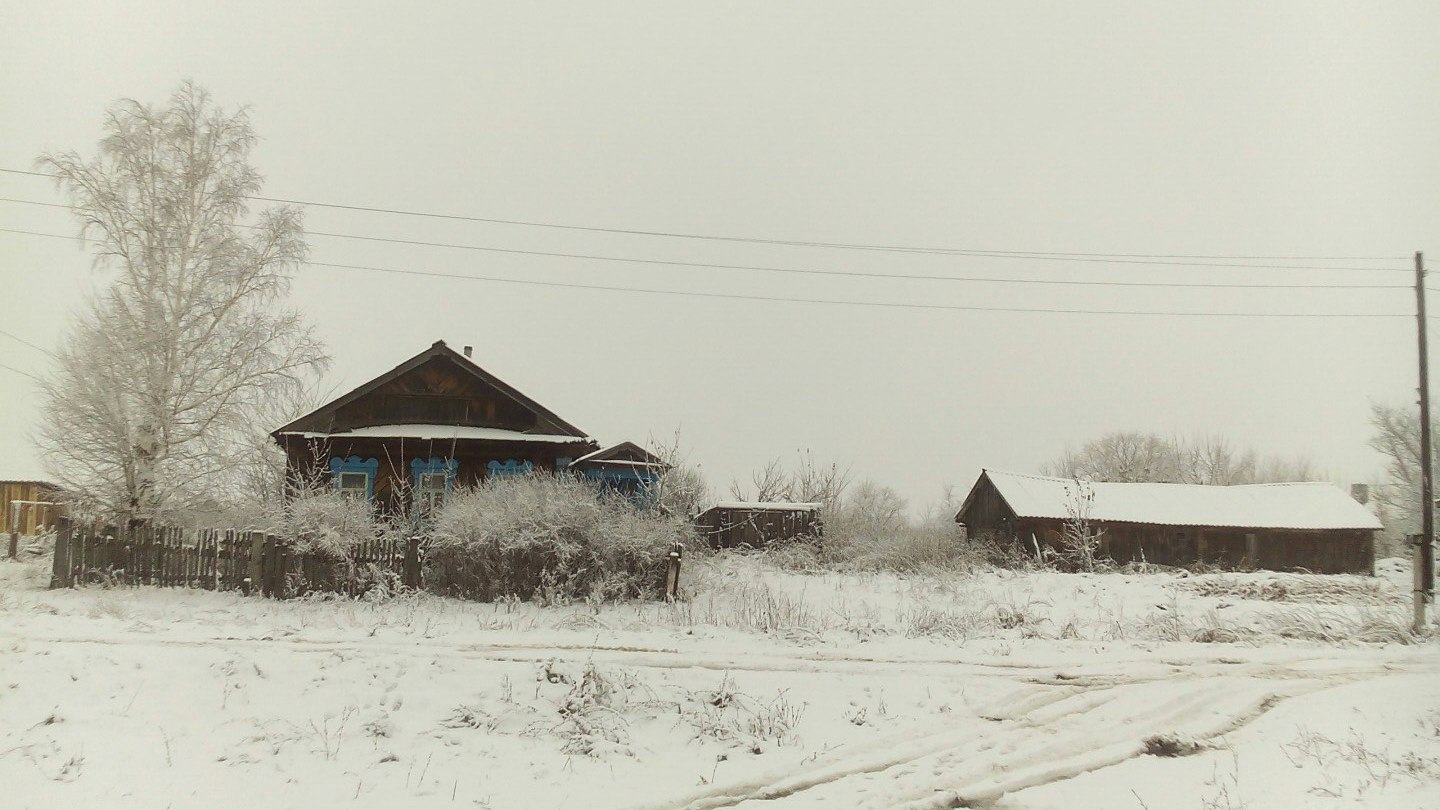 Поселок Свияжный